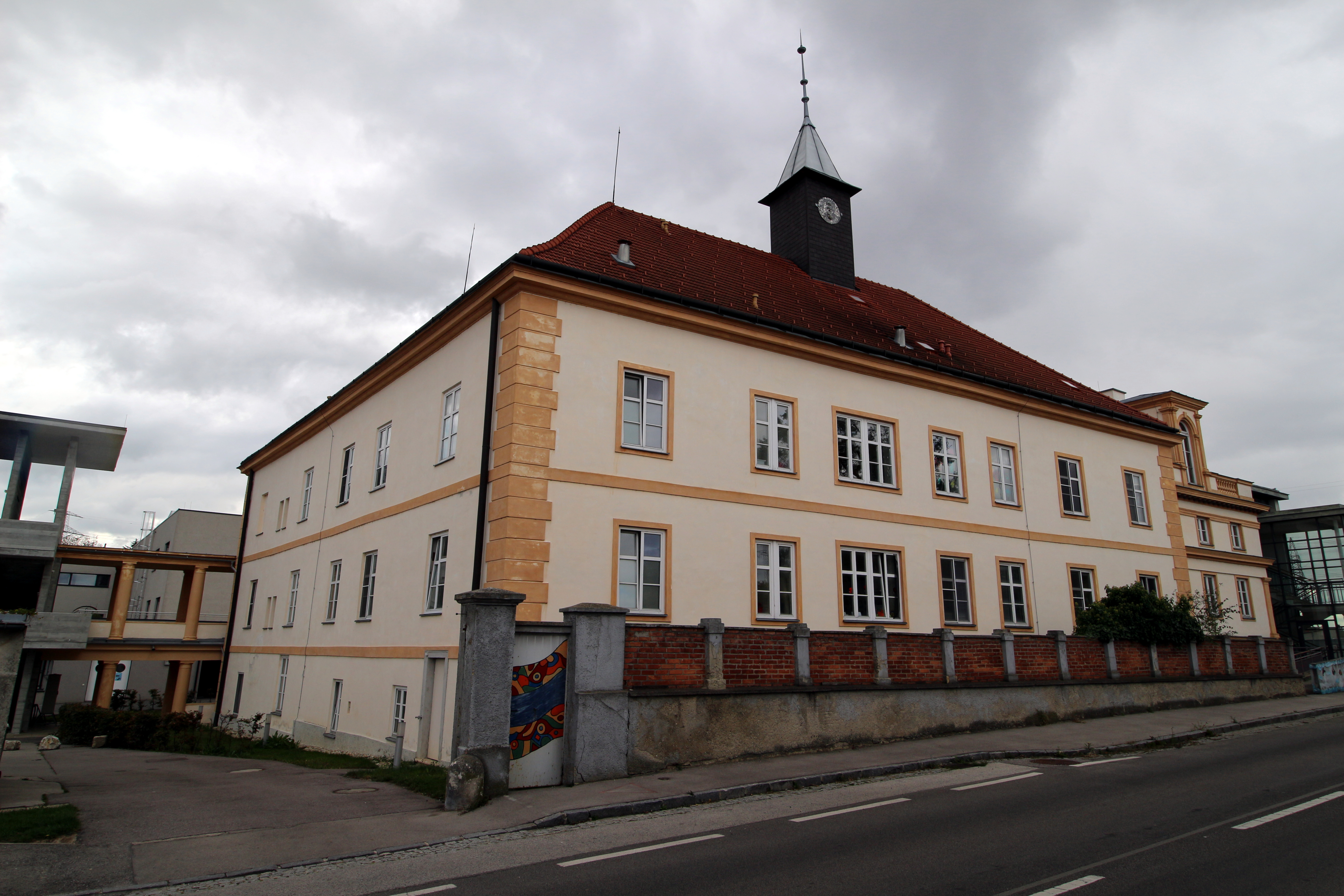 Behindertenheim der Caritas Maria Frieden in Lanzendorf, Niederösterreich.